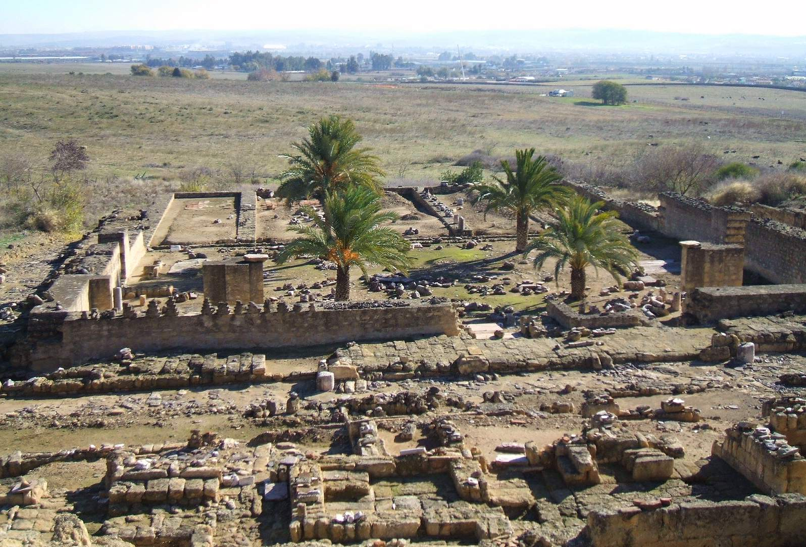 Yacimiento Arqueológico de Medina Azahara (Córdoba)